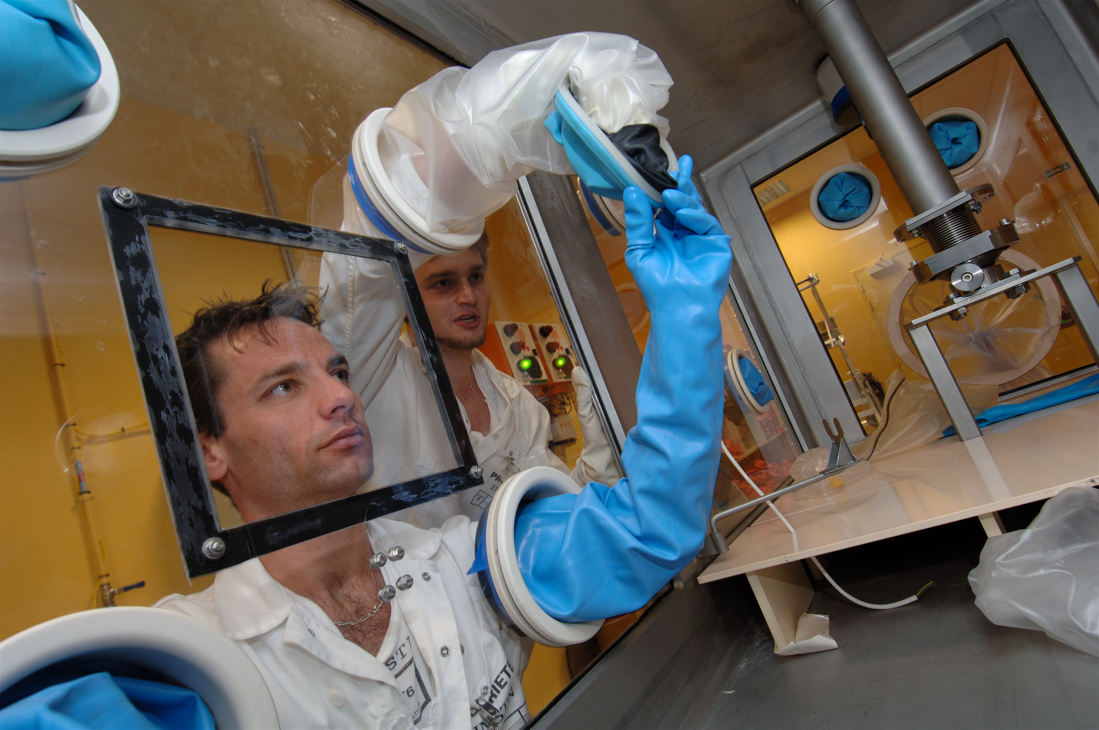 Boîte à gants, INSTN-Cadarache